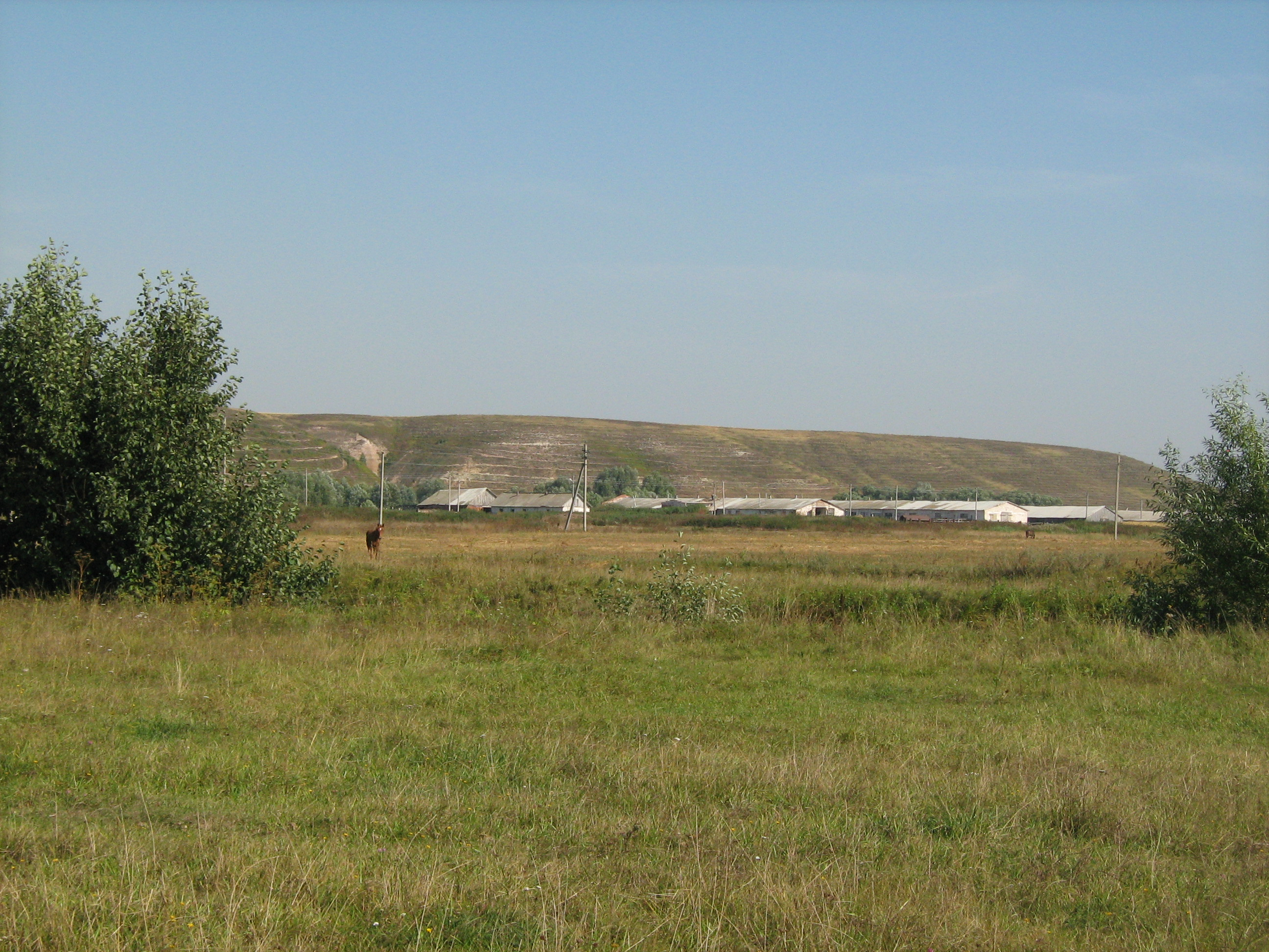 Ферма